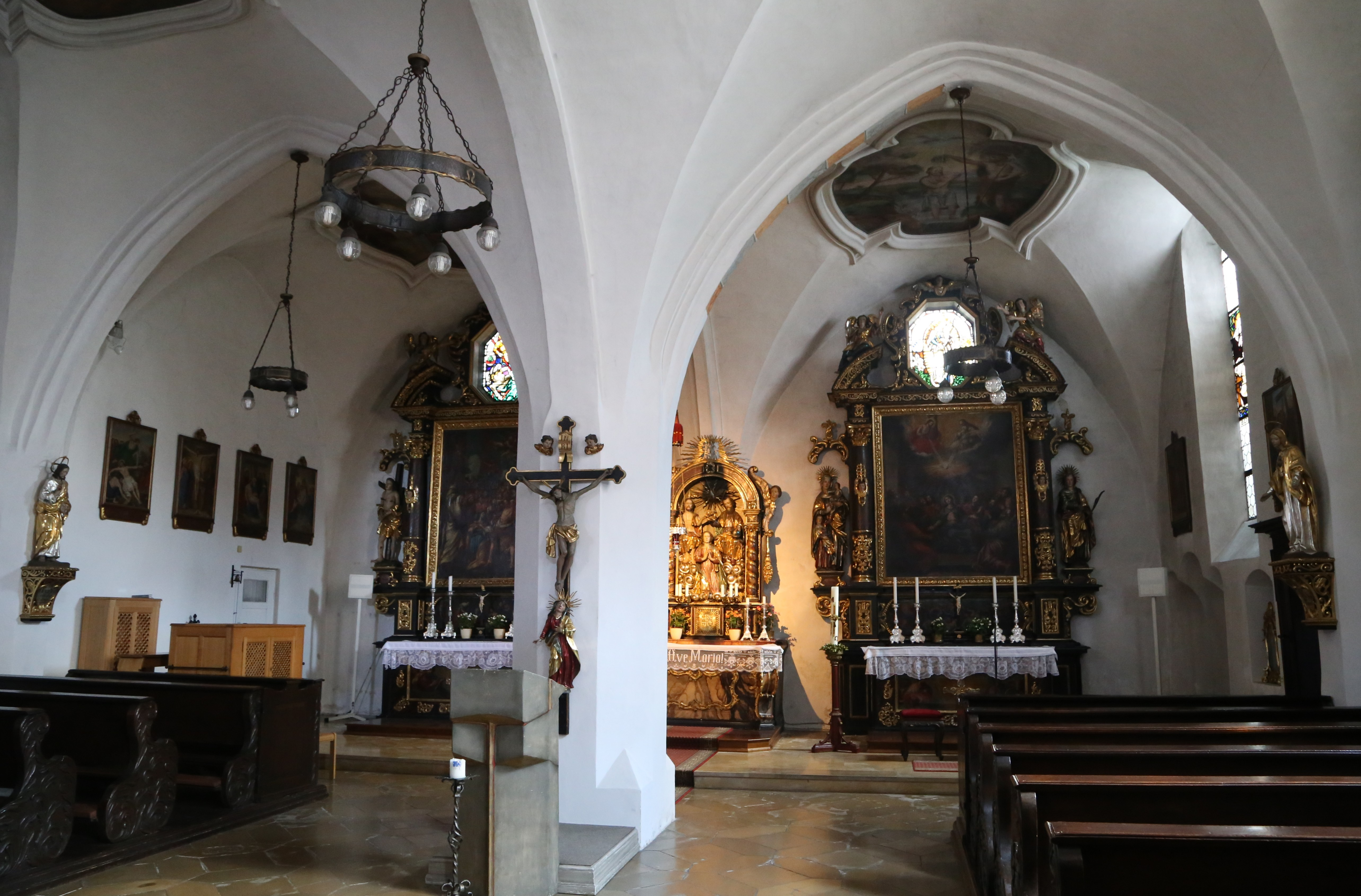 Stadtplatz 37, Aichach; Katholische Spitalkirche Heiliger Geist, zweischiffige Hallenkirche, Fassade mit Volutengiebel und reich gegliedertem Turm, im 15. Jahrhundert, 1642/43 wiederhergestellt, Turm 1734 und 1789; mit Ausstattung; Torbogen